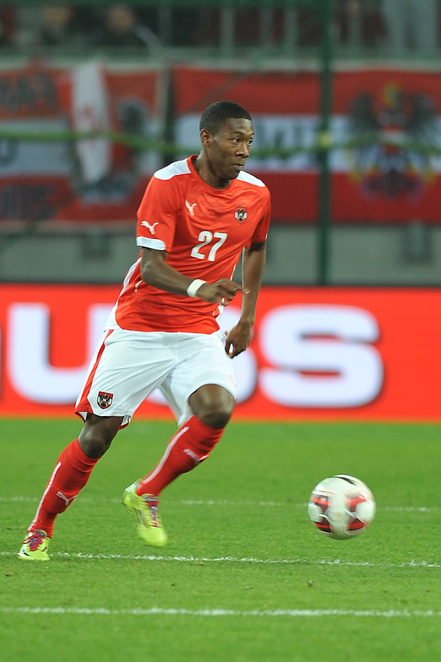 Freundschaftliches Länderspiel Österreich - Uruguay am 5. März 2014 in Klagenfurt: David Alaba